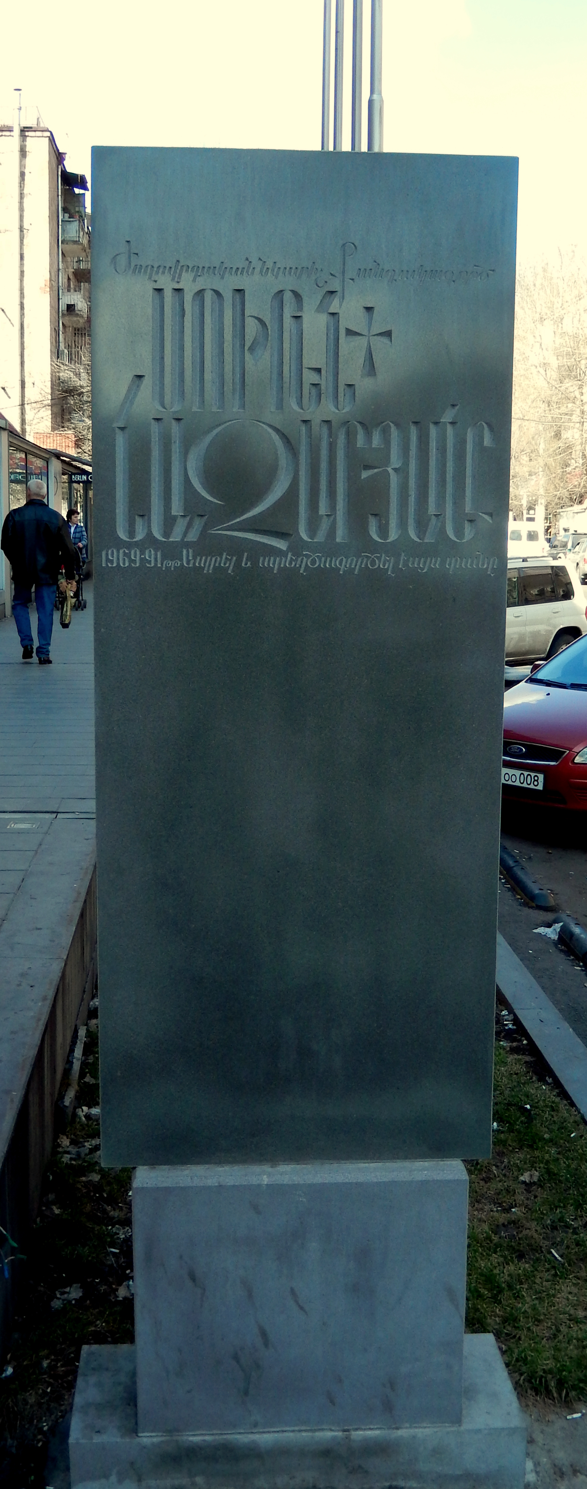 Գտնվումէ Արաբկիր համայնքում, Վահրամ Փափազյան փողոցում 6/231